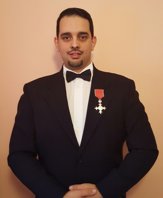 Petr Torák s Řádem britského imperia